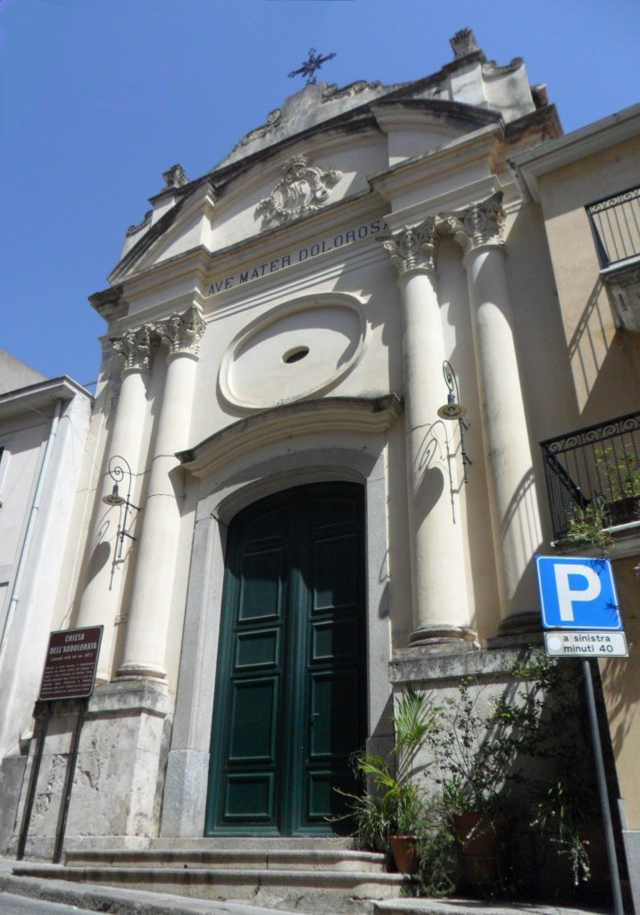 Gioiosa Jonica Chiesa dell'Addolorata facciata